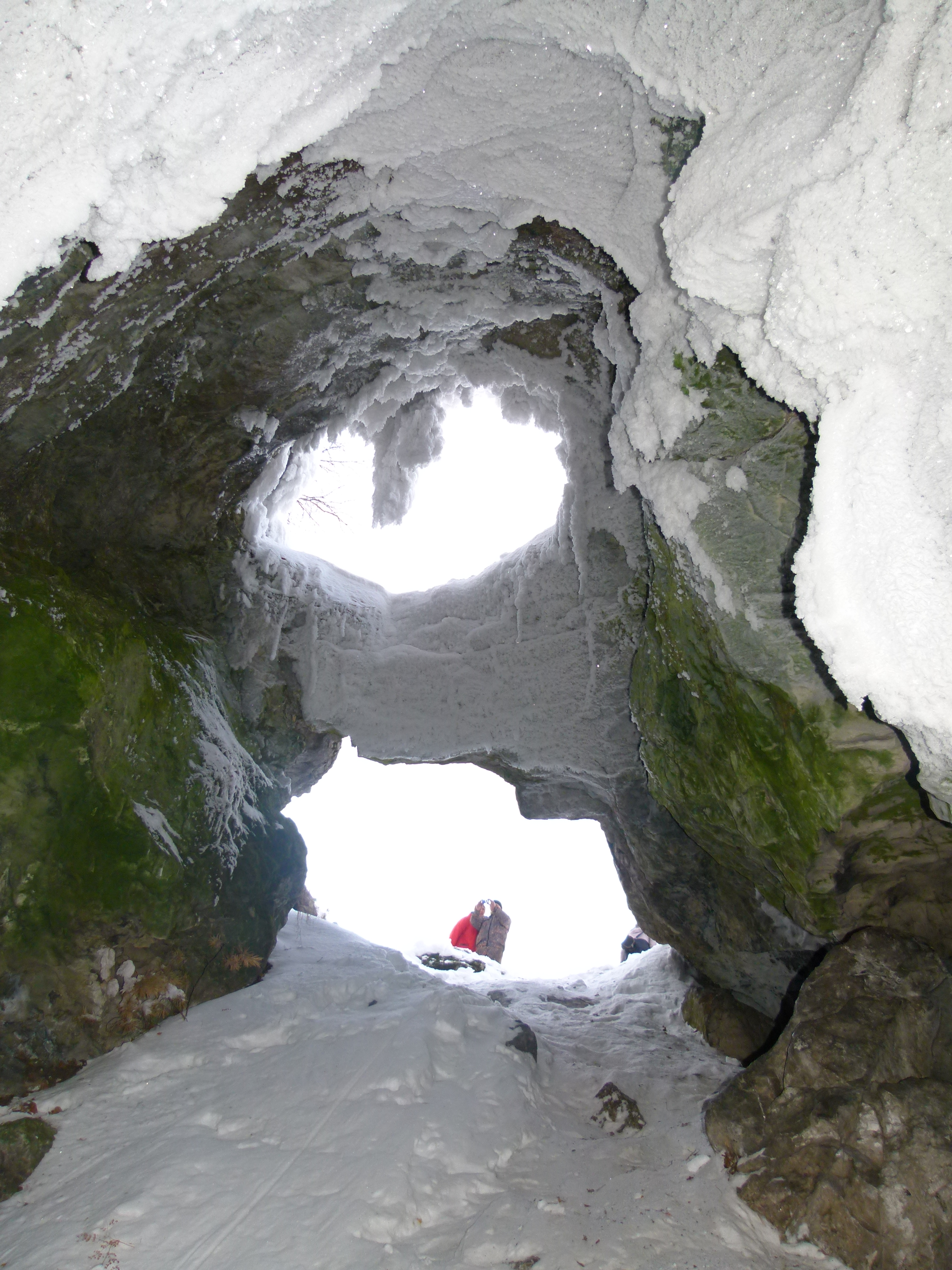 Лаклинская холодная пещера и ее окрестности: Салаватский район, Башкортостан This image is related to the protected area of Russia number 0210198